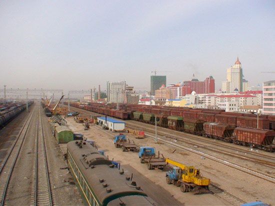 Manzhouli Station